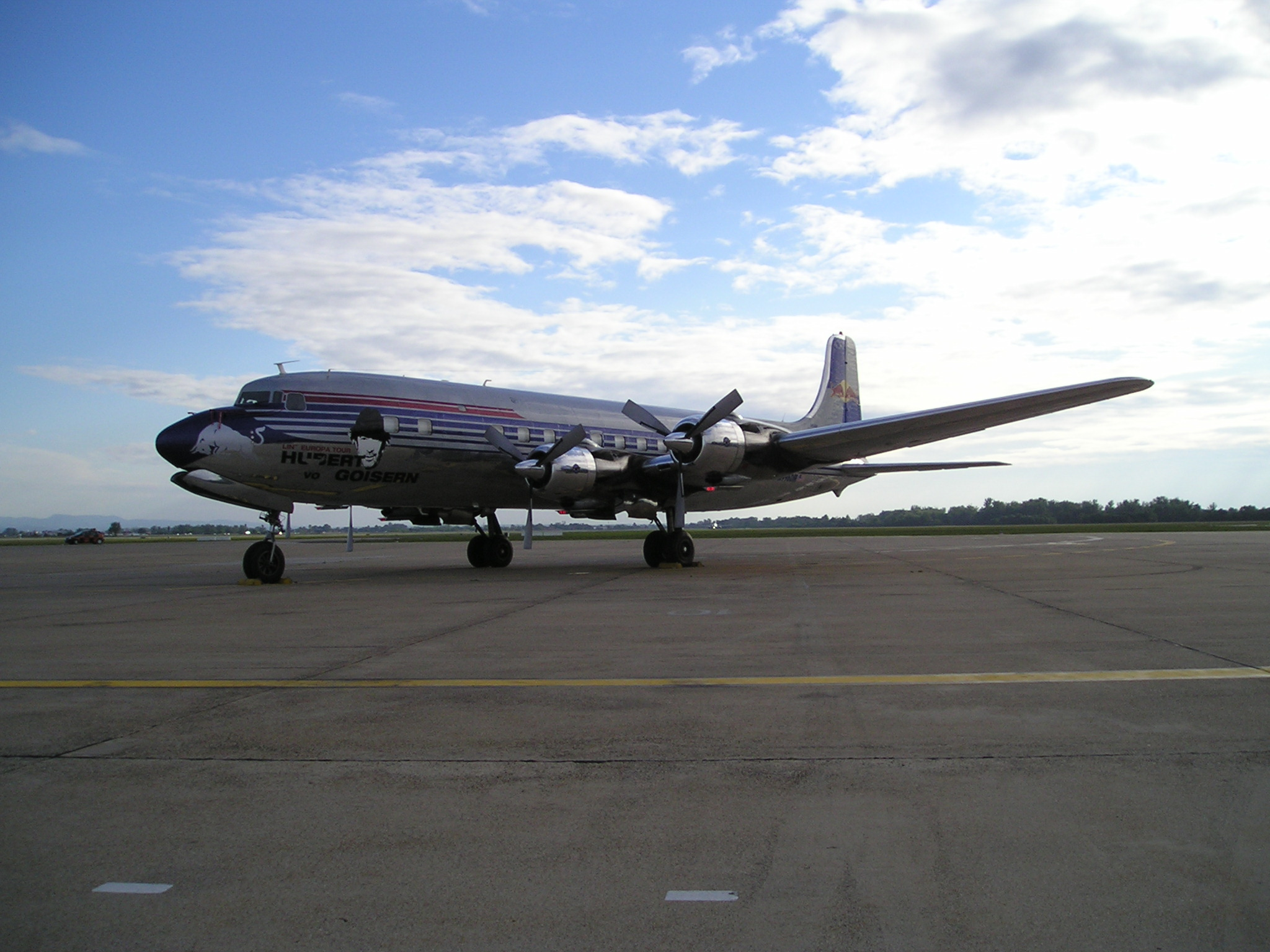 DC-6B, Red Bull